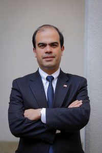 Carlos Charme Fuentes.